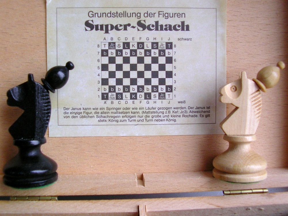 Schwarzer und weißer Janus, Schachfiguren aus dem Super-Schach